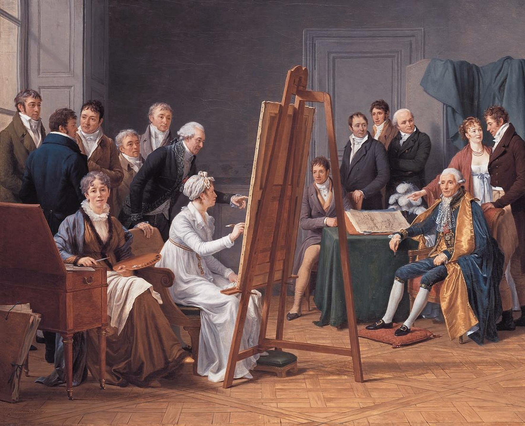 salon de 1808, Le portrait de groupe représente la professeur et amie de l'artiste, Adélaïde Labille-Guiard (1749-1803), épouse du peintre François André Vincent (1746-1816) dans son atelier, aux alentours de 1800, réalisant le portrait du peintre et sénateur Joseph-Marie Vien (1716-1809), en présence de membres de la famille Vien, d'élèves ainsi que de son mari et d'élèves de celui-ci. L'artiste s'est représentée elle-même, assise à coté de son amie, chargeant la palette.